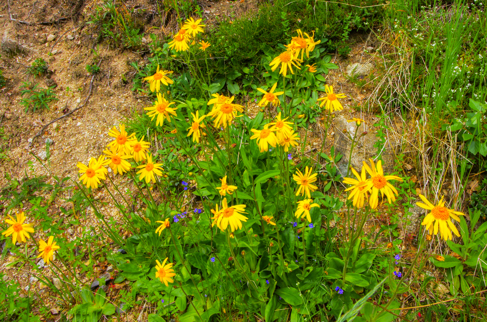 prha arnika (Arnica montana) v CHKO Slavkovský les, u bývalé obce Vranov, okres Sokolov